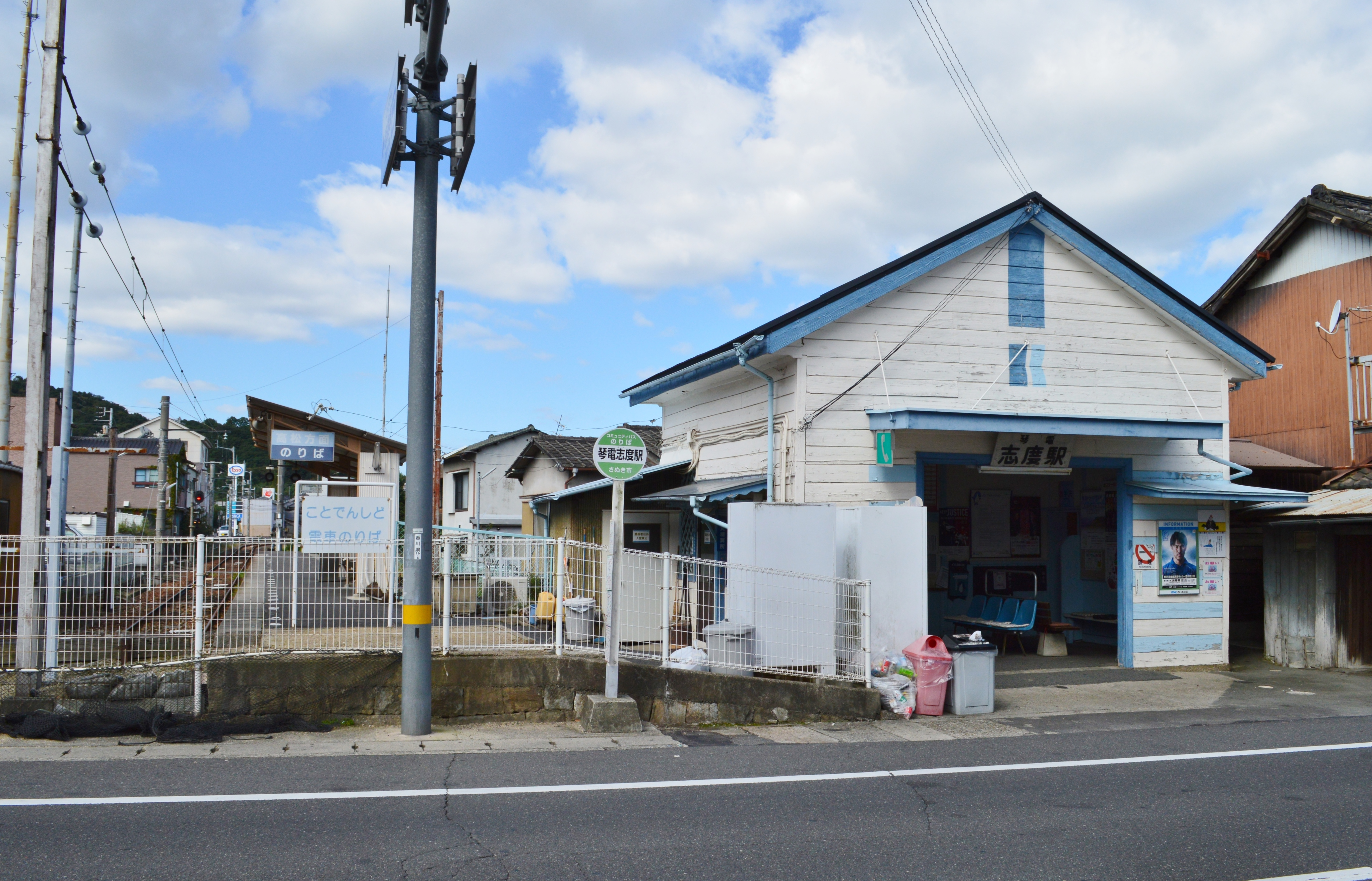 琴電志度駅 駅舎